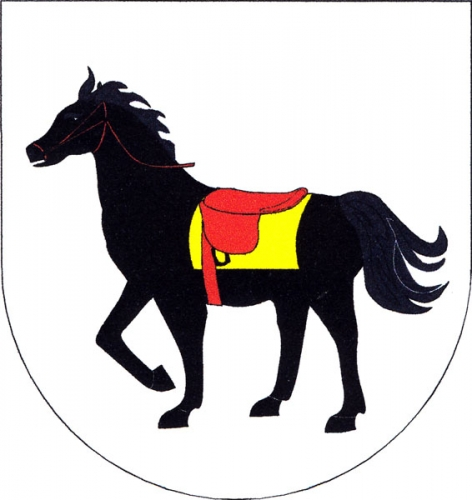 znak, Mirošov , okres Žďár nad Sázavou